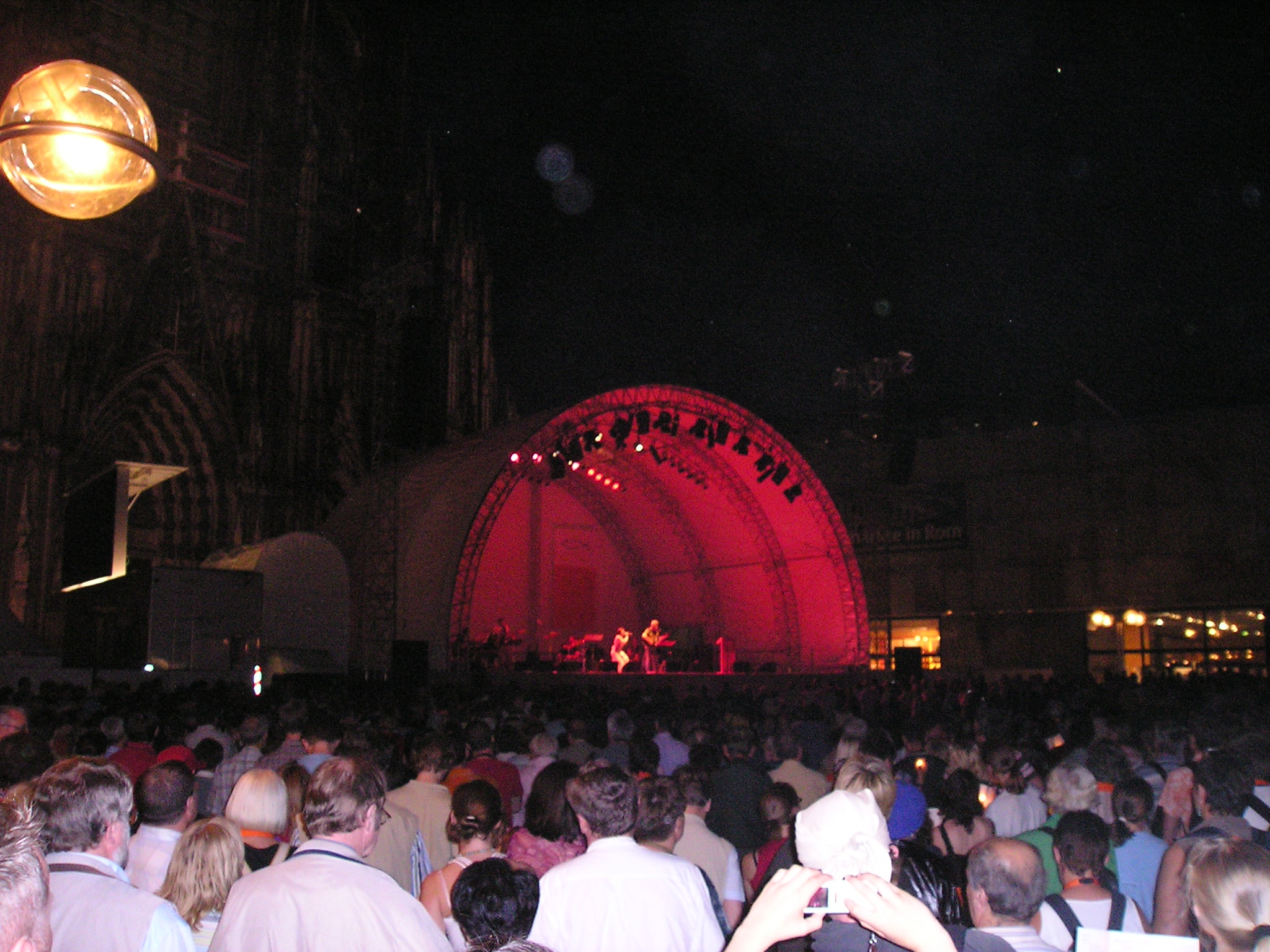 Abendgottesdienst am 08.06.2007, Studiogruppe Baltruweit